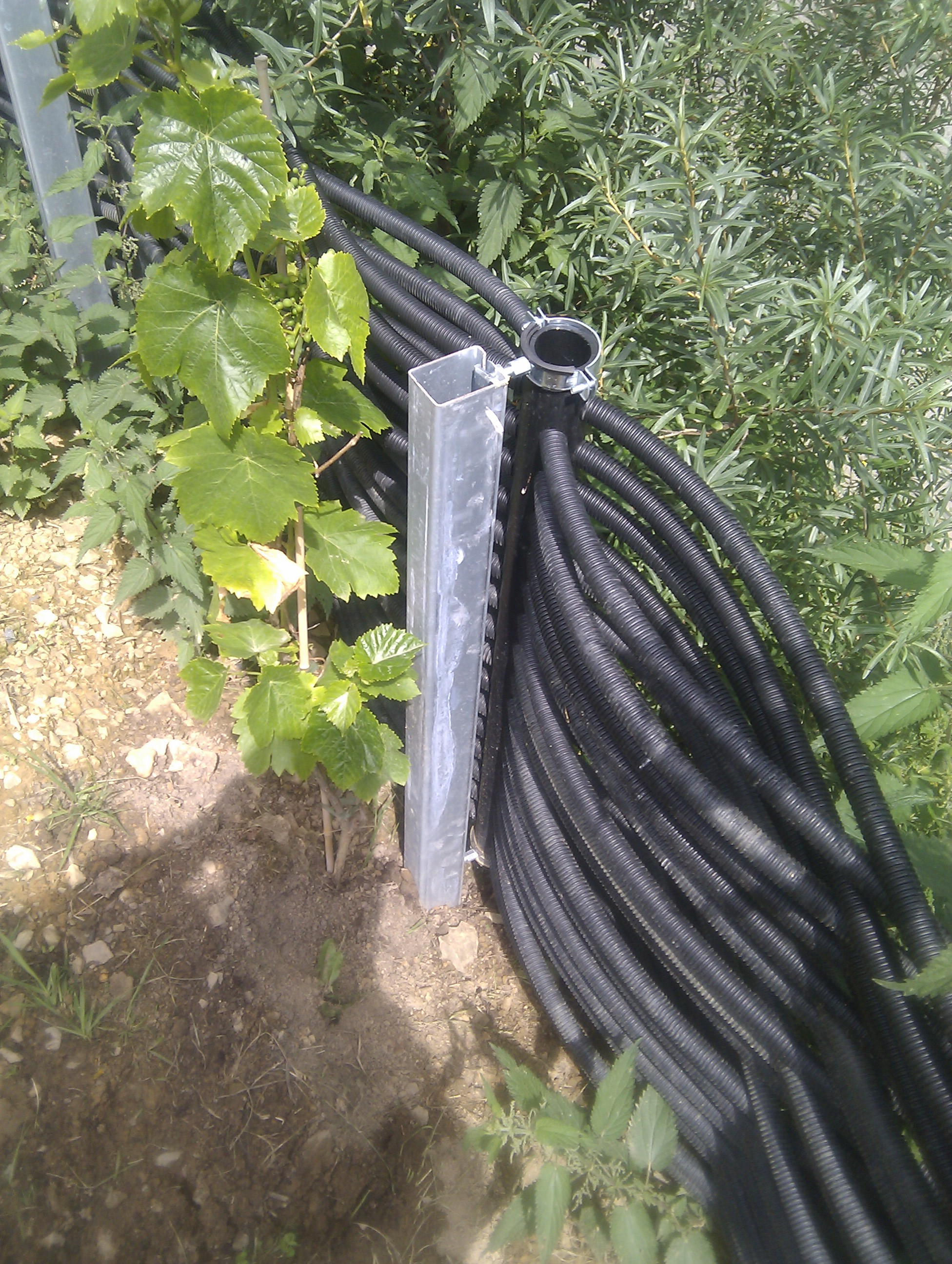 ein bepflanzter Energiezaun der Firma Schlemmer ecotech